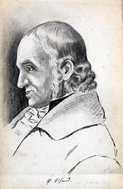 Porträt des Malers Peter Schmid. Bleistiftzeichnung seiner Tochter Wilhelmine Schmidt, 1838. Dieses einzige derzeit bekannte Porträt verwandte Theodor Wunderlich als Frontispiz in seiner Schrift Peter Schmids Leben und Werke., Dresden 1888. Stadtbibliothek Trier.